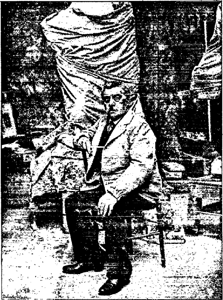 photo d'Alexandre Falguière dans son atelier